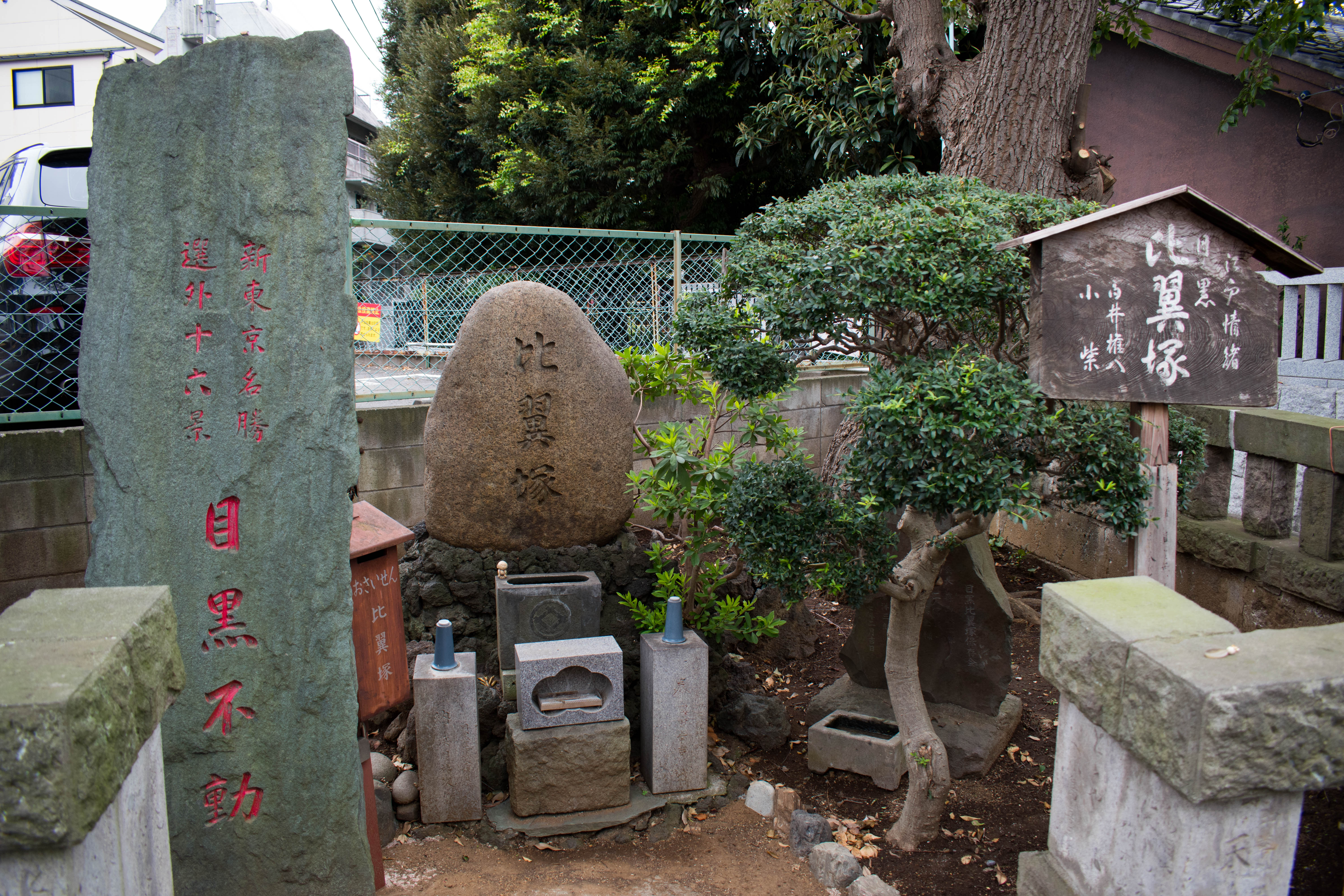 白井権八・小紫 比翼塚。東京都目黒区 目黒不動尊龍泉寺門前。